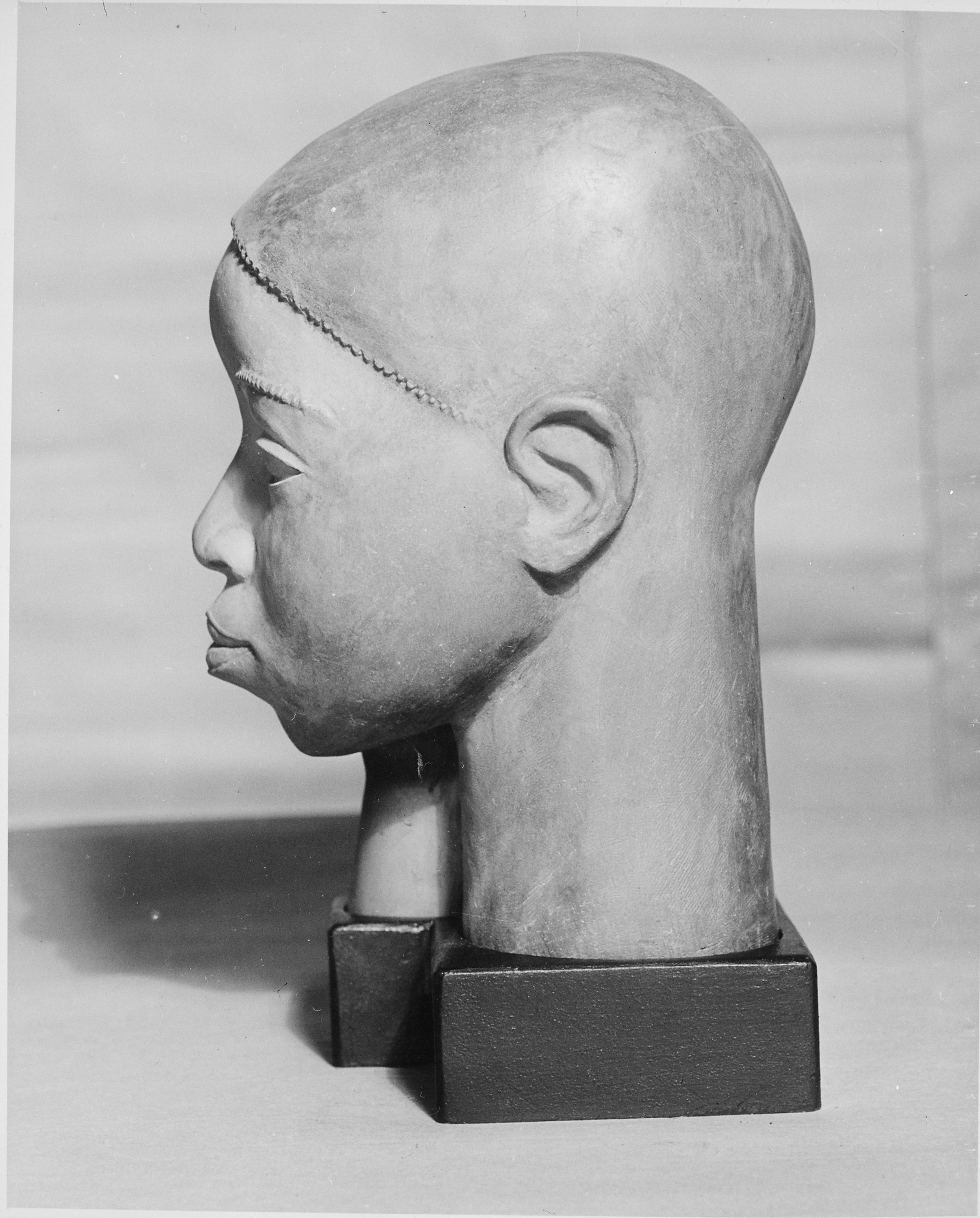 General notes: Sculpture.